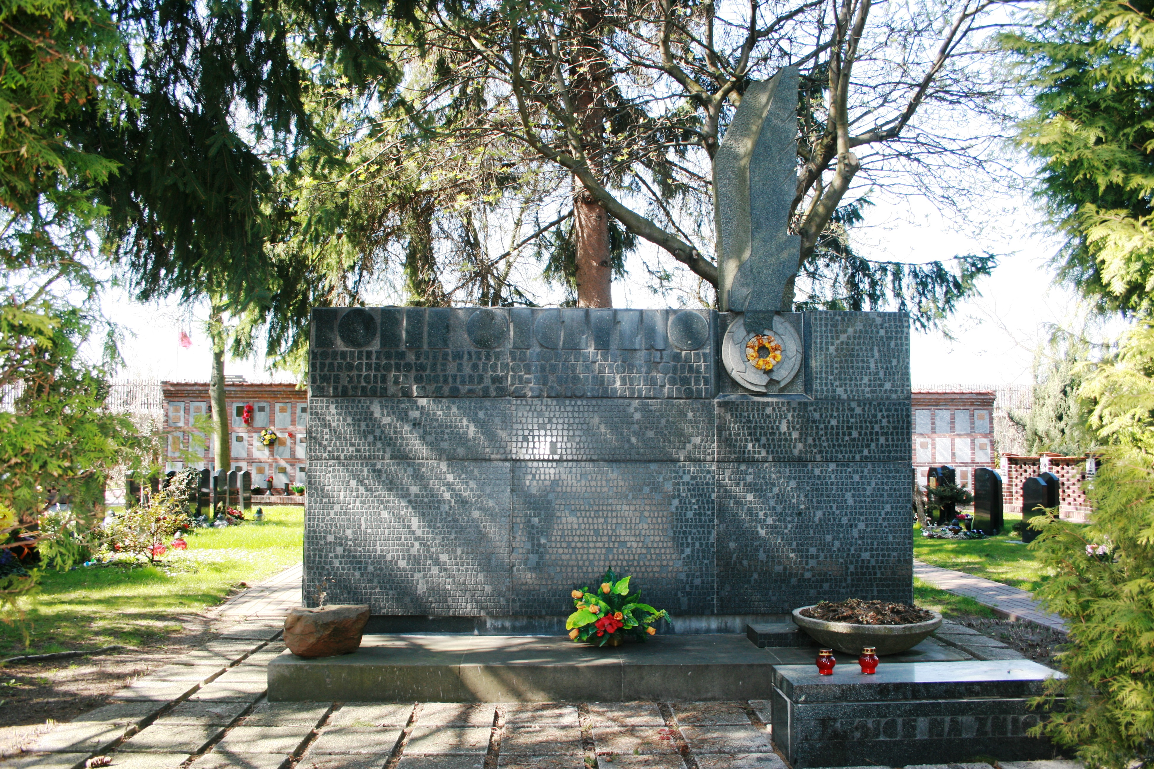 Kwatera I Samodzielnej Brygady Spadochronowej na Powązkach Wojskowych w Warszawie